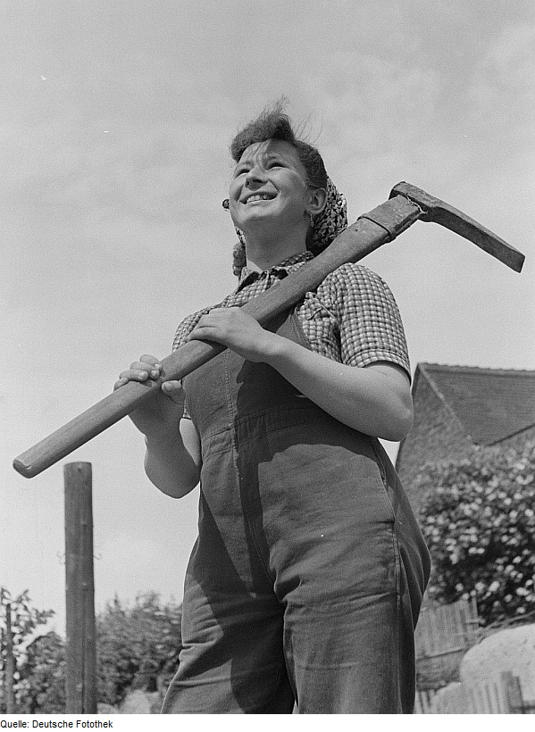 Original image description from the Deutsche Fotothek Junge Frau mit Hacke